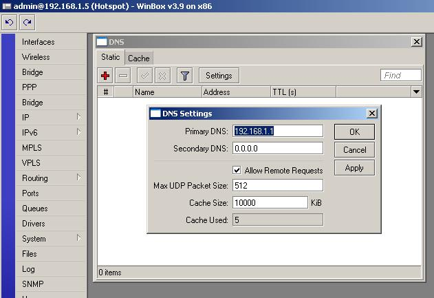 Монгол: Дотоод бүтцийн зураг